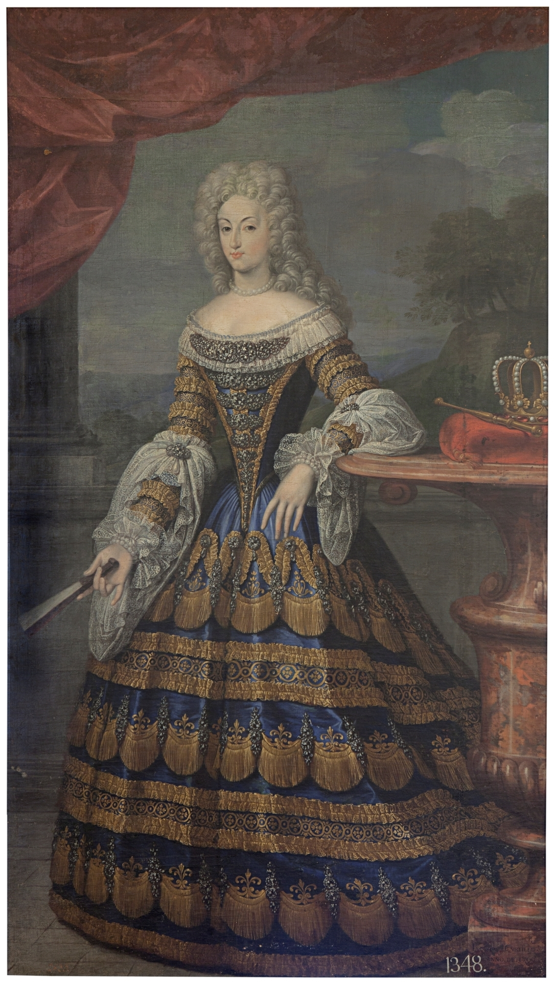 Retrato de la reina Mariana de Neoburgo (1667-1740), que fue reina consorte de España por su matrimonio con el rey Carlos II de España. La reina aparece repesentada de cuerpo entero, en una galería abierta a un paisaje. En la mano derecha sostiene un abanico plegado, mientras que acoda su brazo izquierdo sobre un velador de mármol rojo, en el que reposa un cojín con la corona y el cetro, que señalan su condición regia, así como el cortinaje rojo y la columna que se aprecian tras ella.